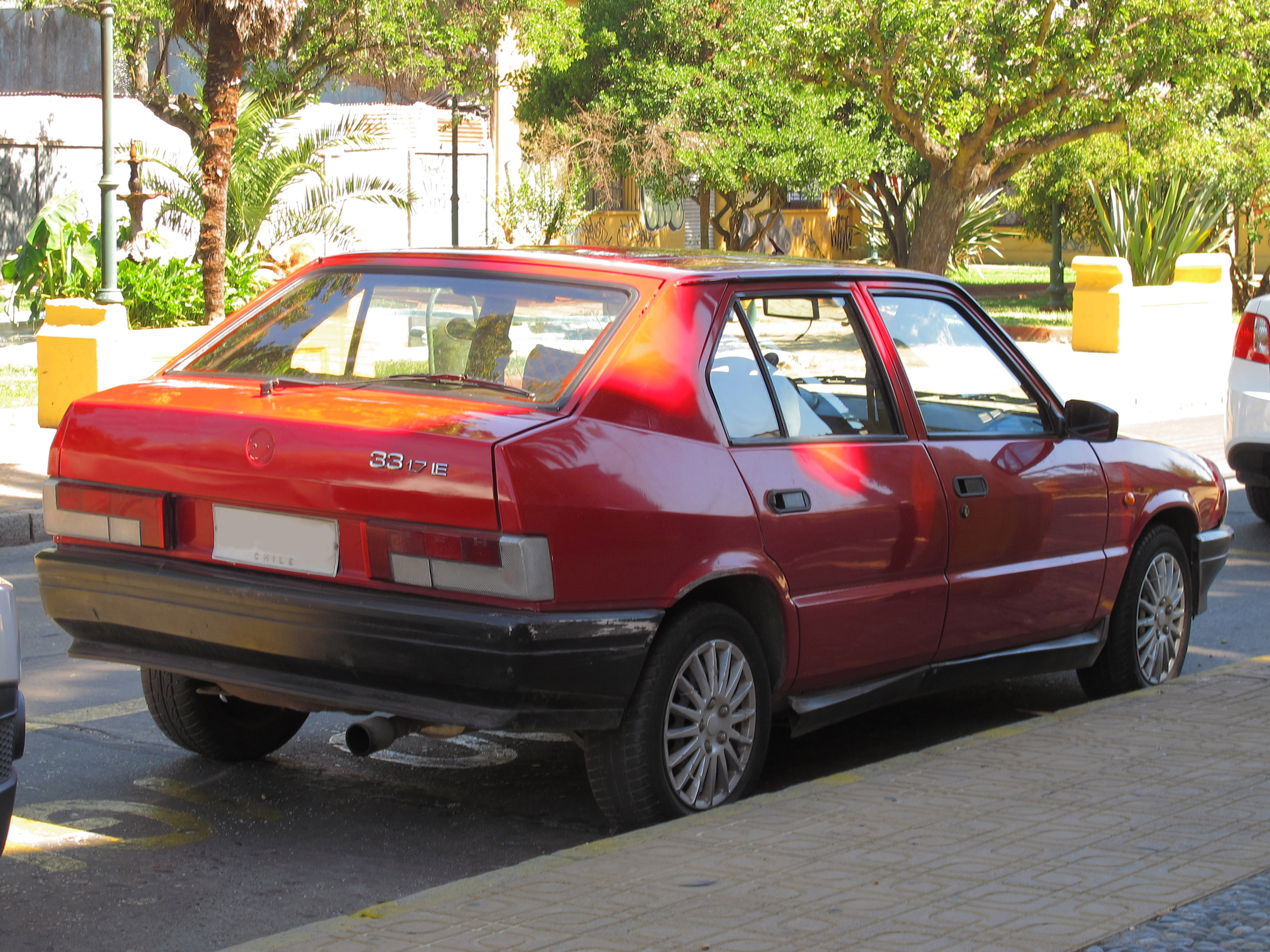 Alfa Romeo 33 1.7 iE 1990